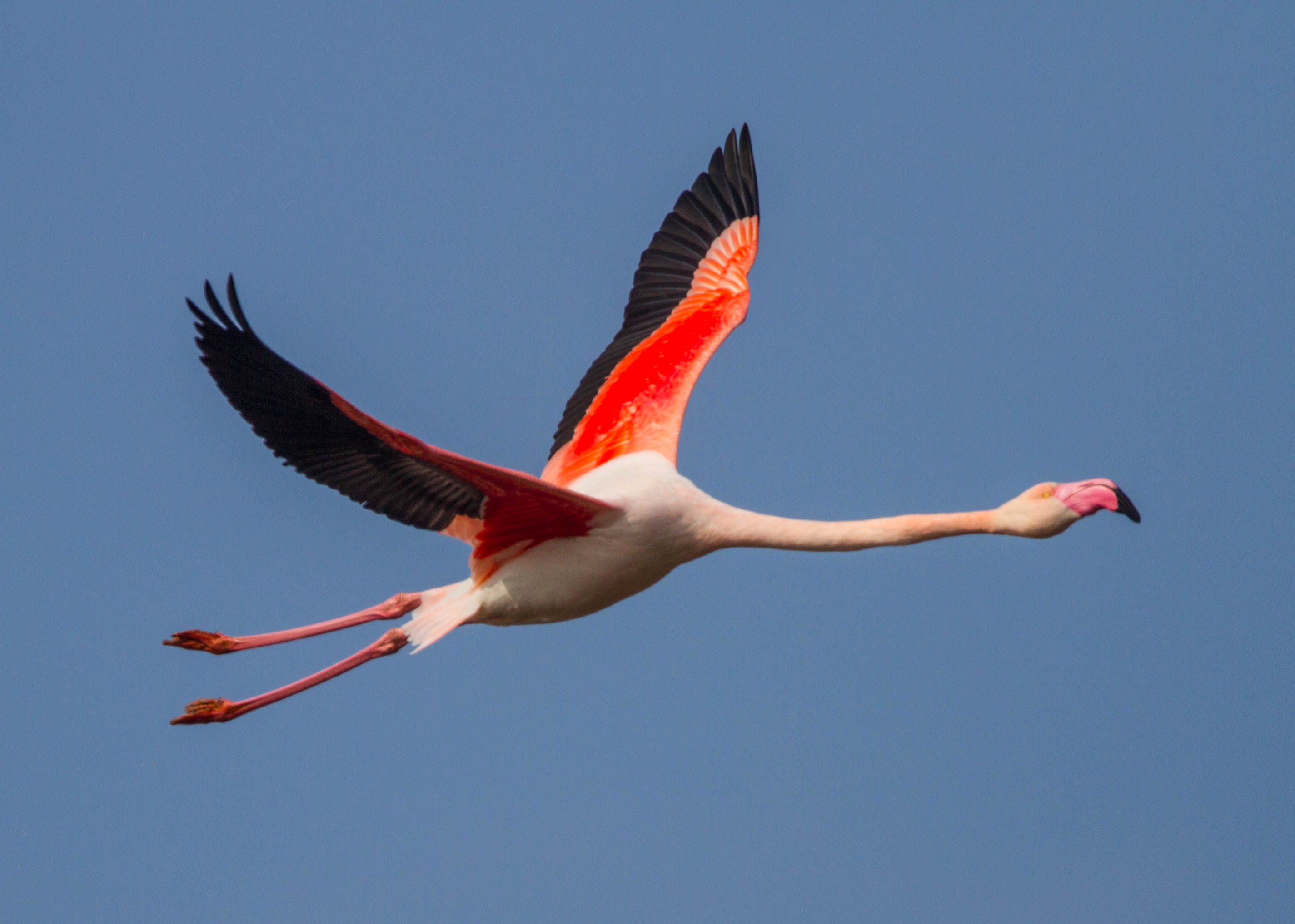 Phoenicopterus roseus, Camargue, France